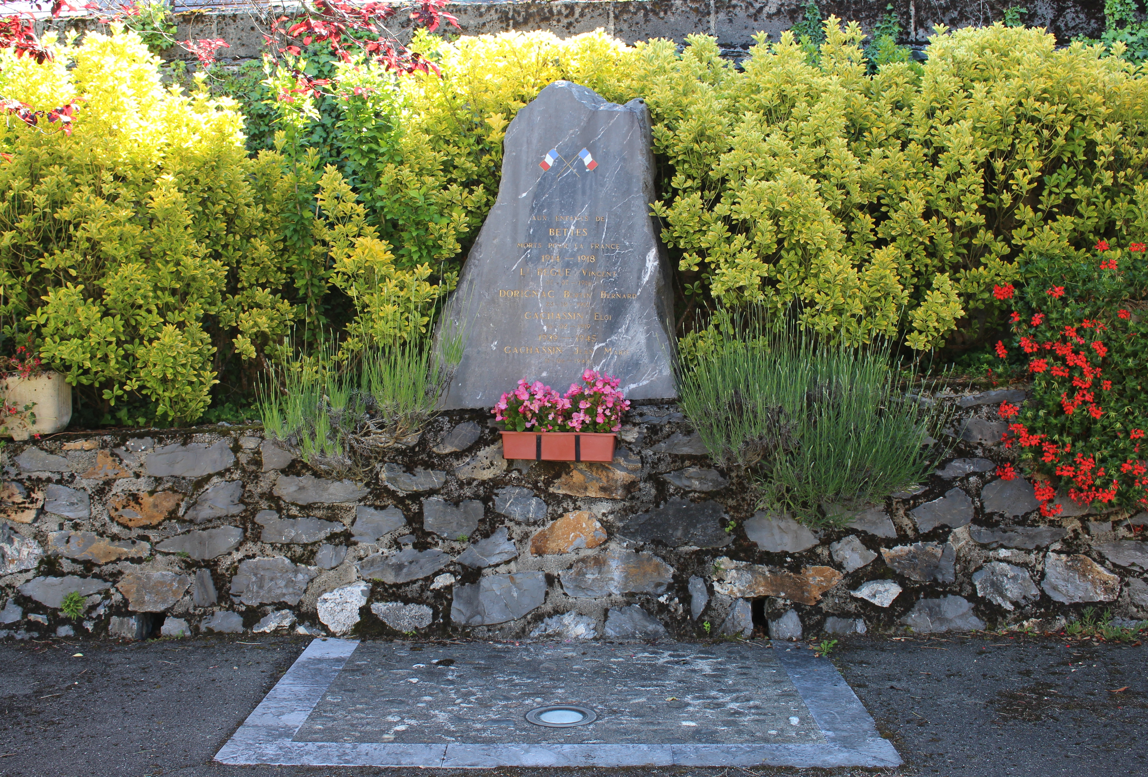 Monument aux morts de Bettes (Hautes-Pyrénées)